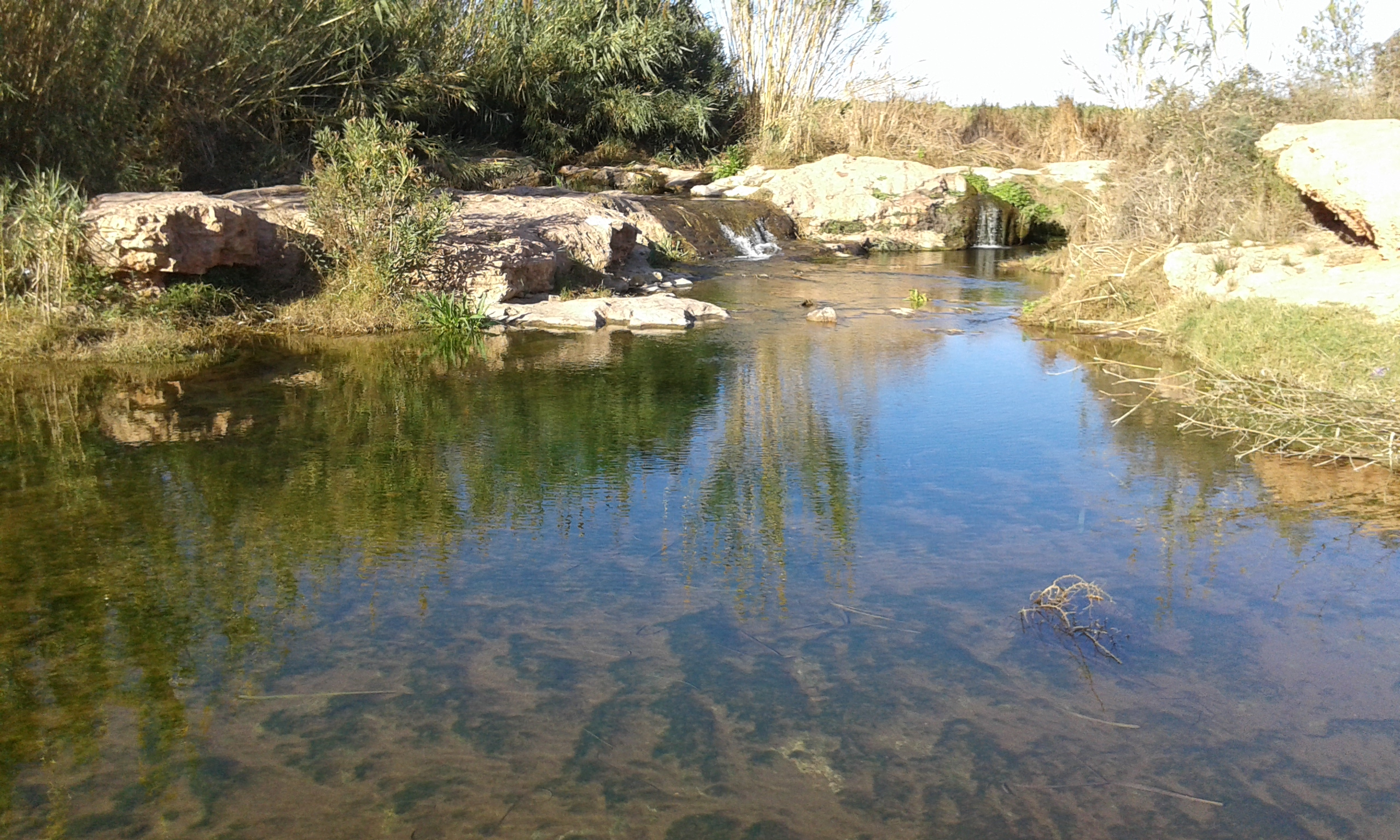 Ullal del Pont Sec al Barranc del Carraixet